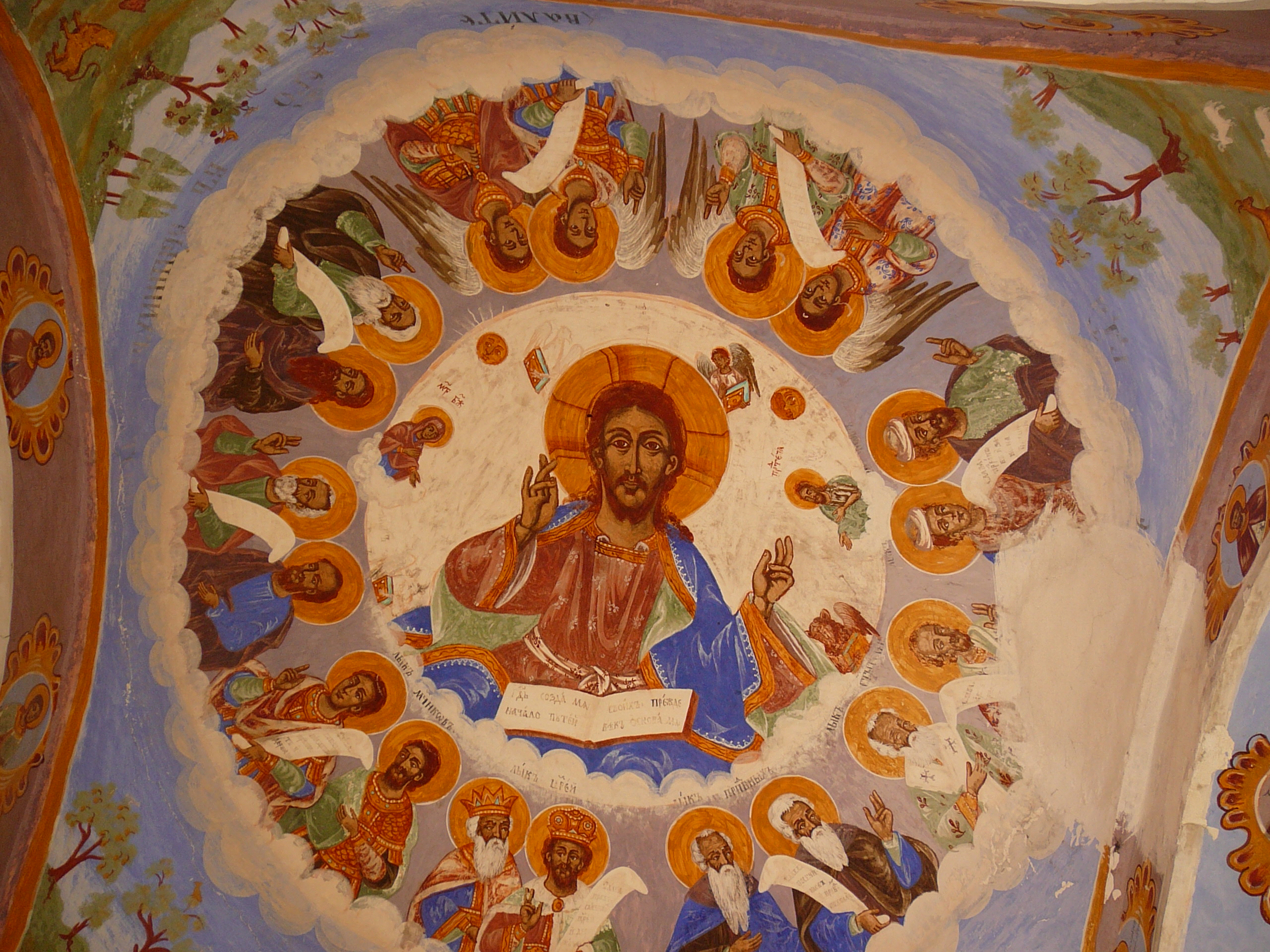 Фреска от Соколския манастир